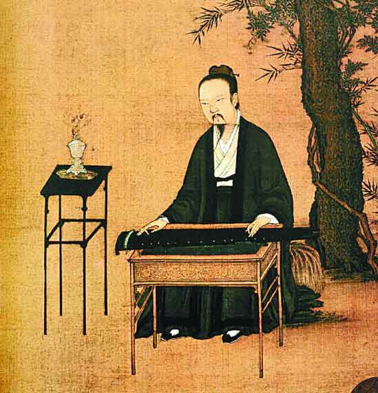 北宋《听琴图》局部，图中男子身着对襟褙子